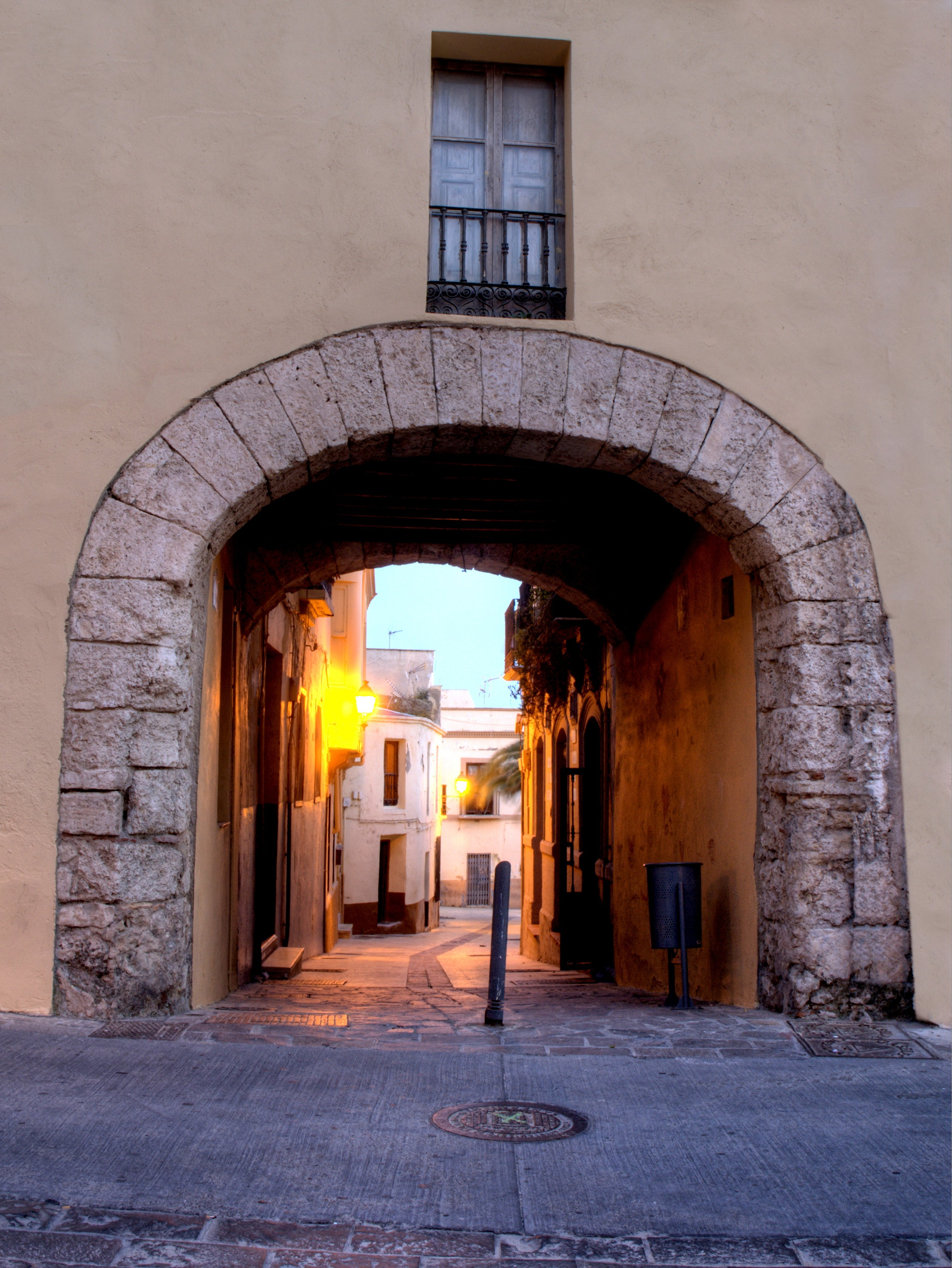 Calle de San Miguel